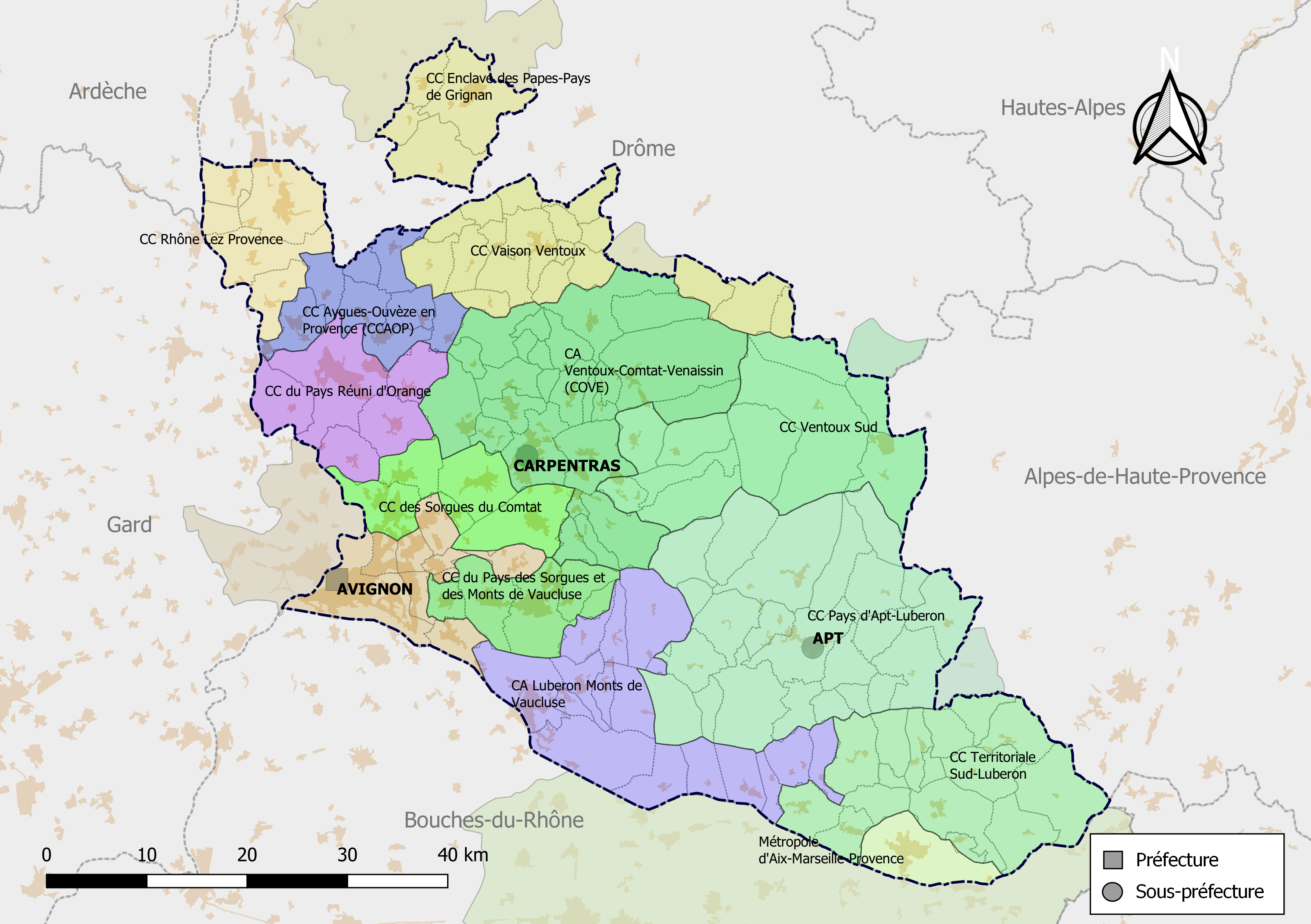 Carte des intercommunalités du département de Vaucluse, France. Composition au 1er janvier 2019.